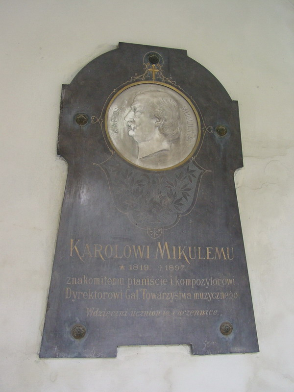 Tablica pamiątkowa poświęcona Karolowi Mikulemu na ścianie Katedry Ormiańskiej we Lwowie, wykonana przez Cypriana Godebskiego (1835-1909).